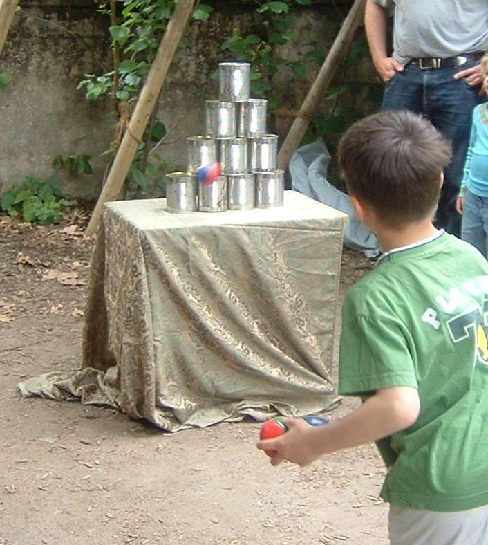 Kind beim Dosenwerfen auf einem Schulfest in Frankfurt